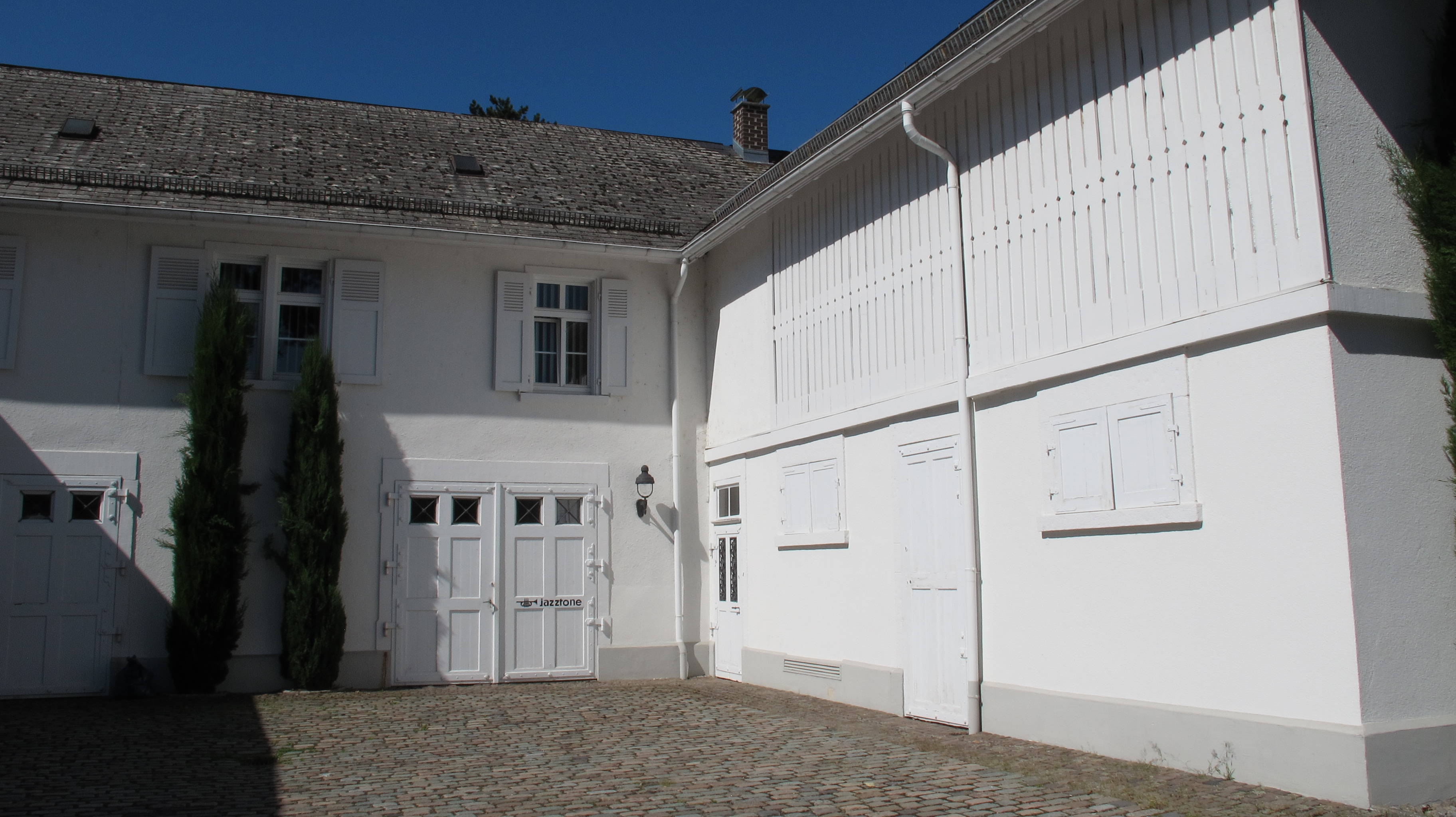 Jazztone Lörrach Eingangsbereich im Hof